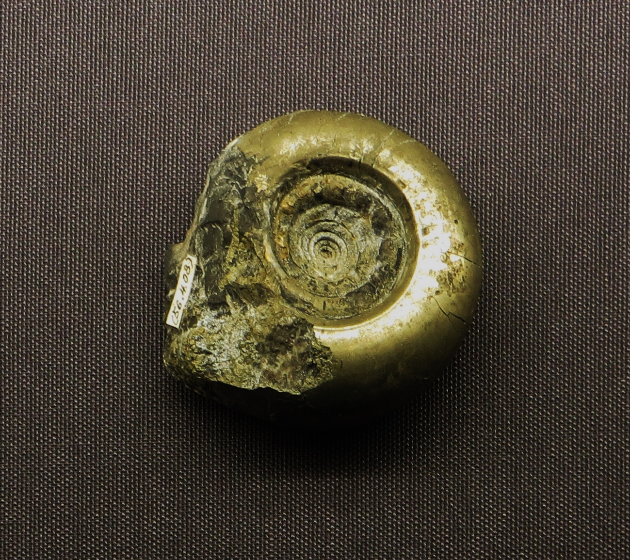 Fossil of ammonoid- Took the picture at Natural History Museum, Wiesbaden